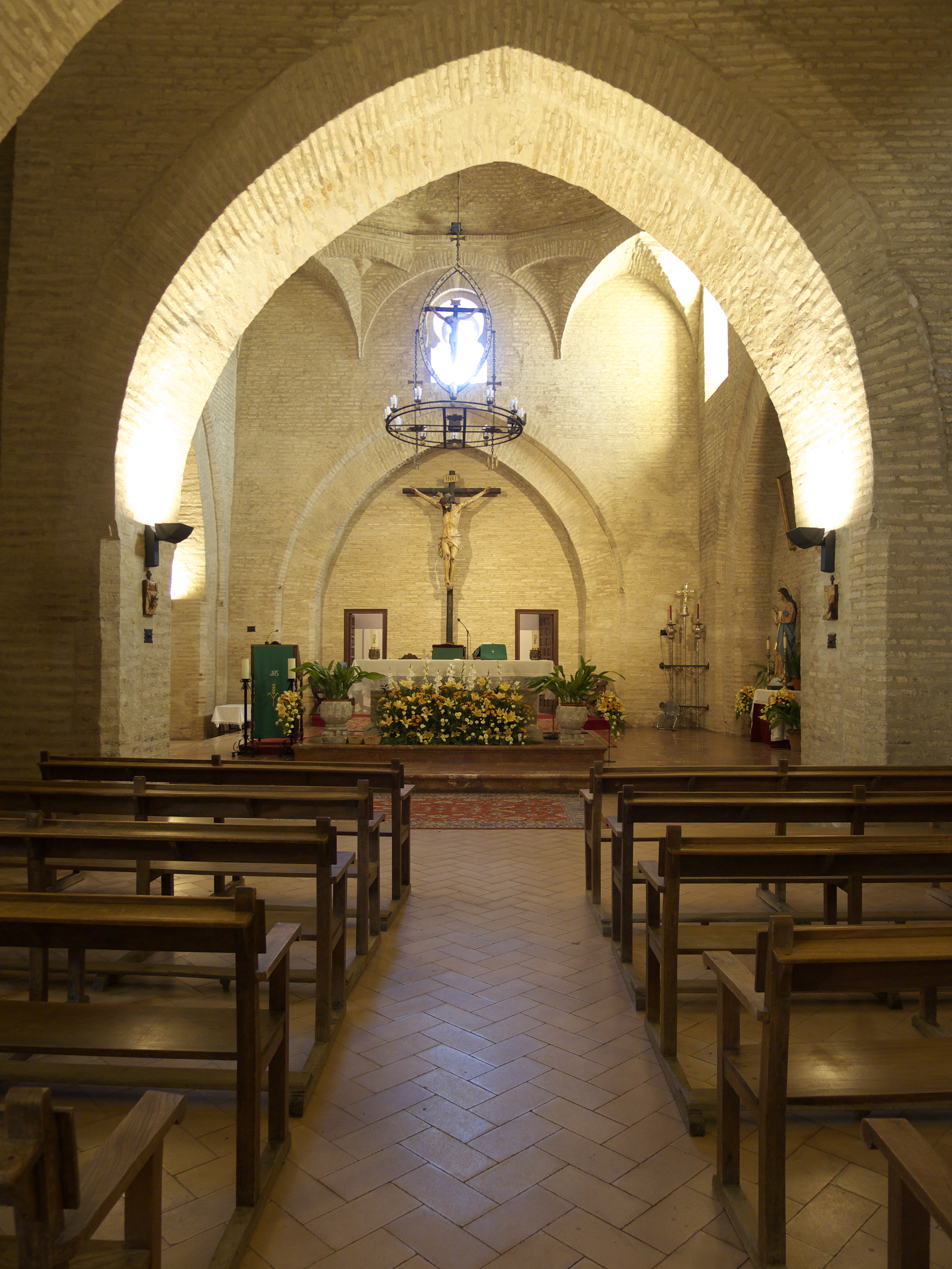 Nave Sur (s. XII). Sus arcos transversales nos recuerda la arquitectura de las Atarazanas de Sevilla.